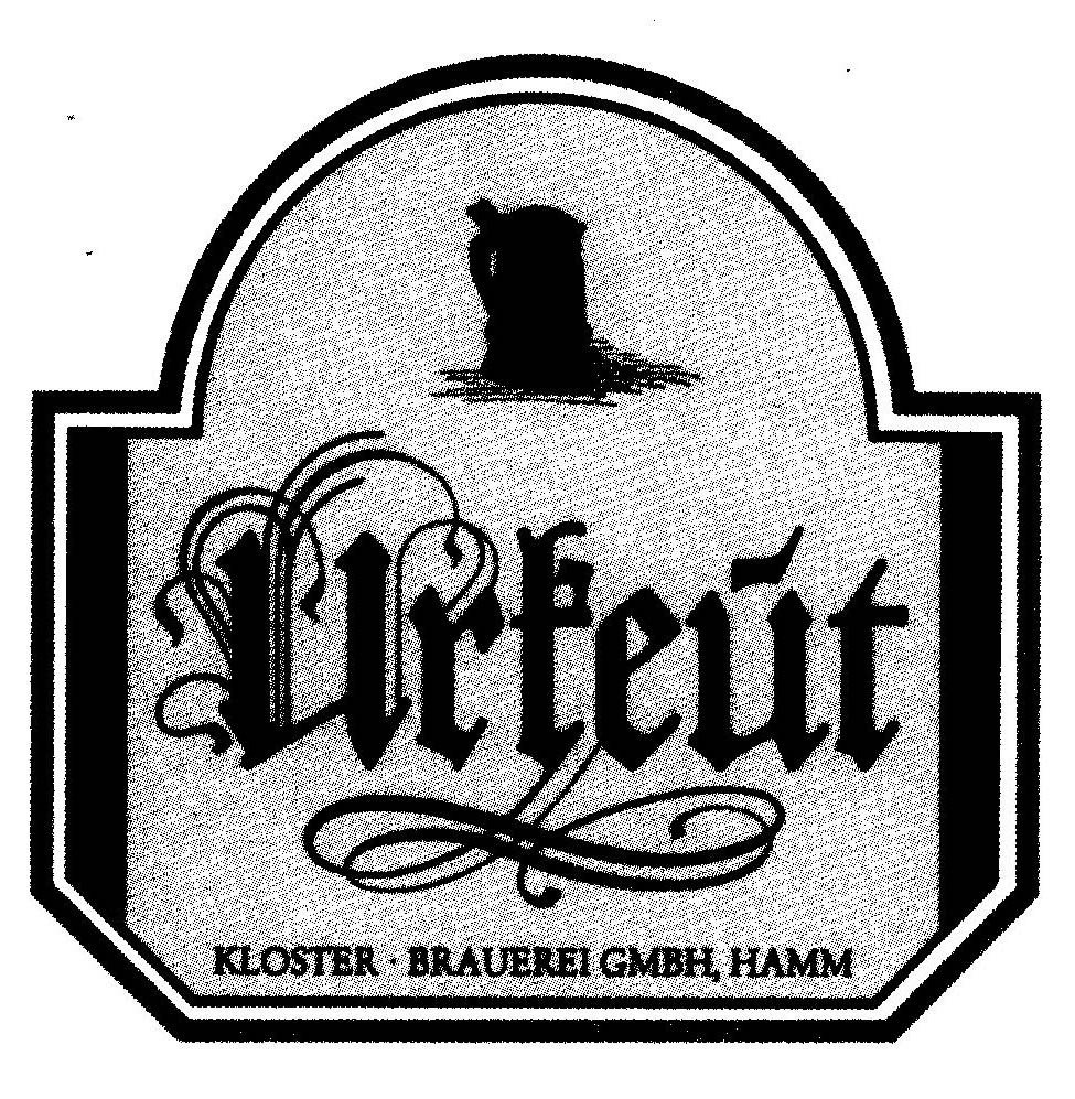 Das Foto zeigt das Logo des "Urkeut" von der Kloster-Brauerei Hamm.